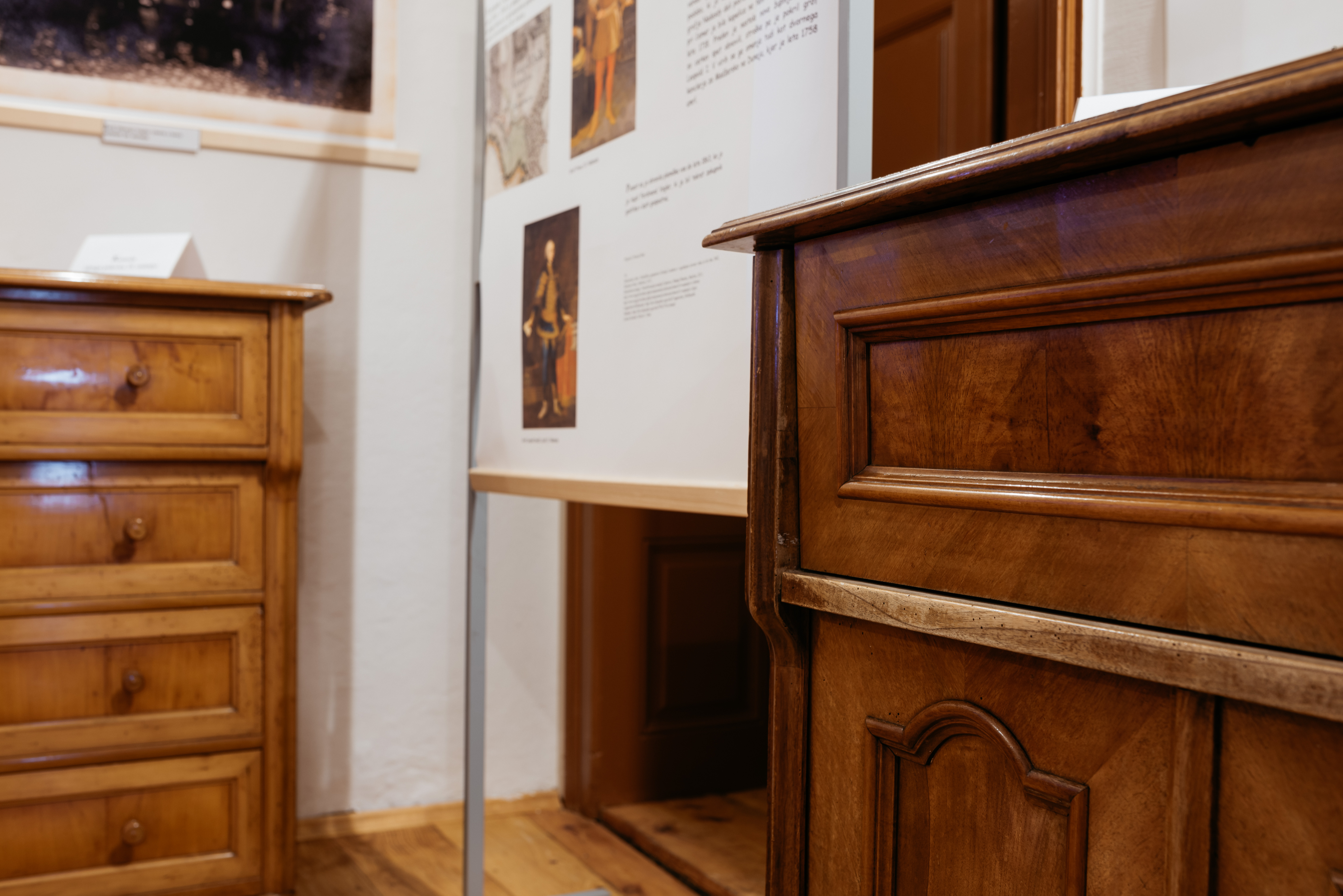 Pohištvo v objektu Vogler